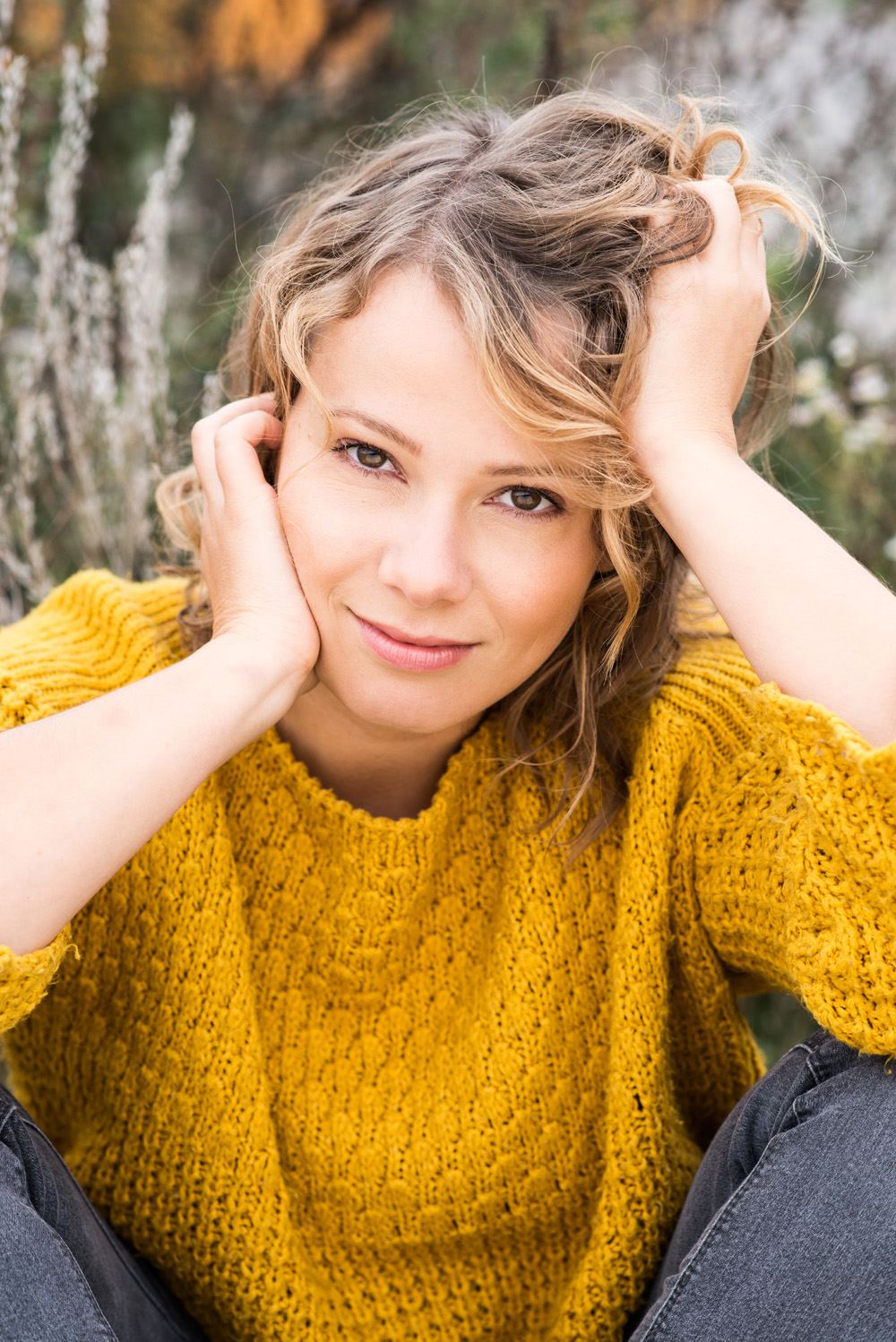 Anne im Jahr 2014 bei einem Foto-Shooting mit Alan Ovaska.